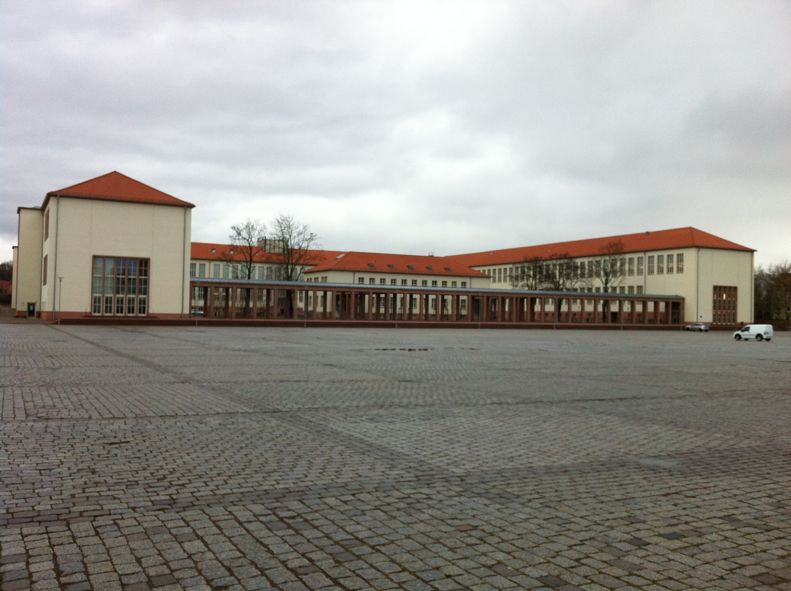 Ehemalige Heeres- und Luftwaffennachrichtenschule Halle, Heideallee. Nördliche Dreiflügelanlage am Appellplatz